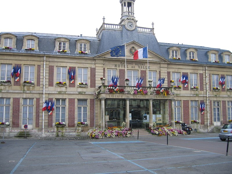 Mairie de Maisons Alfort France, pavoisée pour le 11 novembre